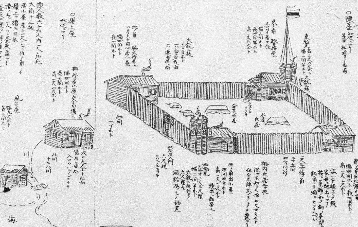 Рисунок поста Муравьёвского (1853-1854) на месте нынешнего г.Корсаков (Сахалинская область)